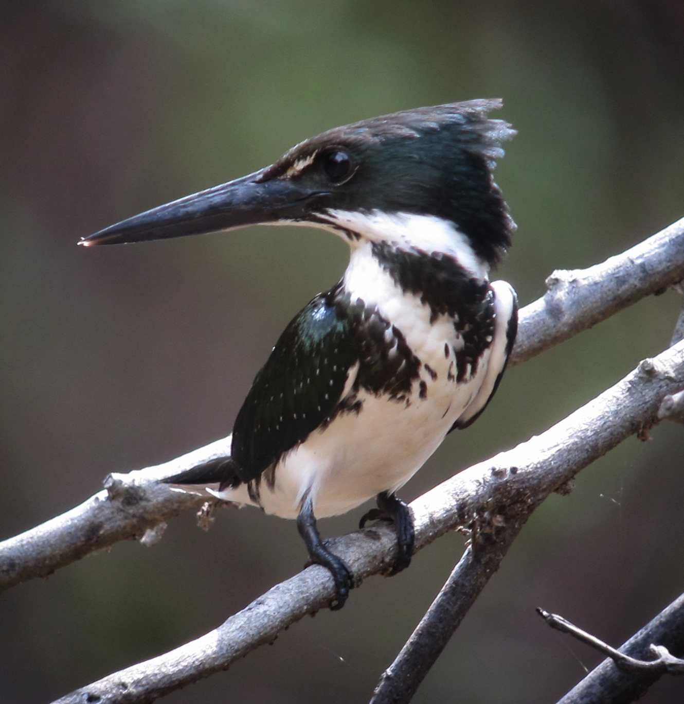 Puerto Carreño, Vichada, Colombia